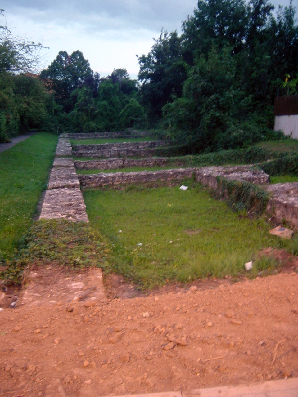 Mauerreste des Kastell Alzey, Jean-Braun-Strasse Ecke Frankenstr.